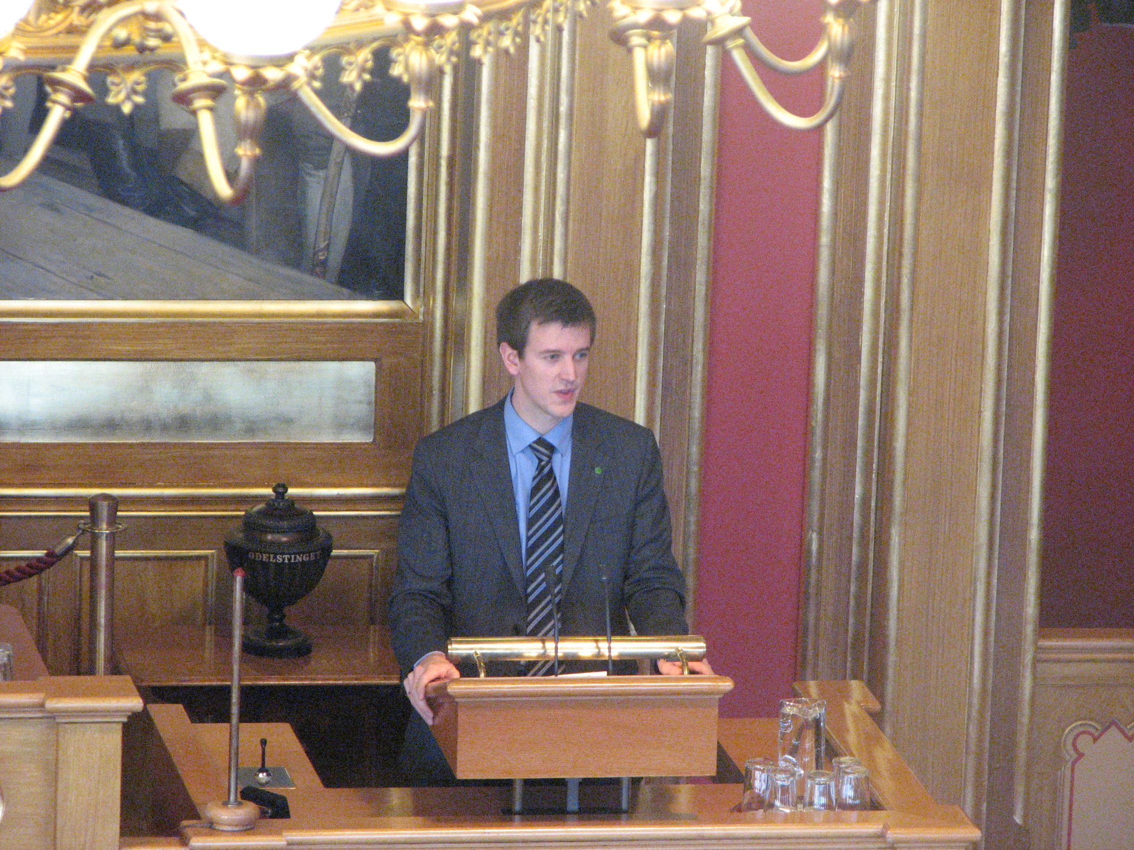 Stortingsrepresentant Erling Sande (er vara, men møter fast for statsråd Liv Signe Navarsete) for Sogn og Fjordane Senterparti i Stortinget 12. februar 2009.